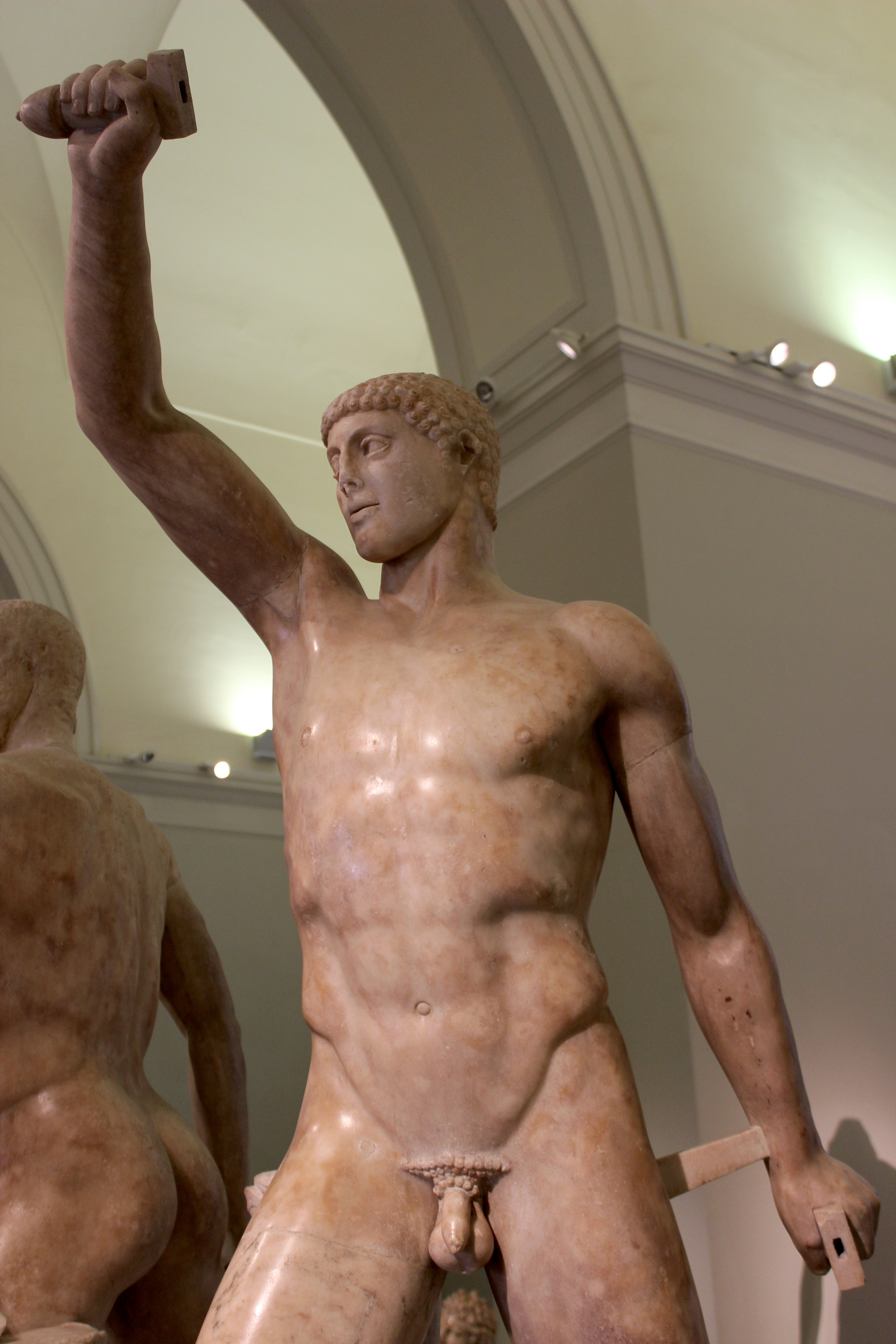 Nápoles. Museo Archeologico Nazionale. Harmodio y Aristogeiton.